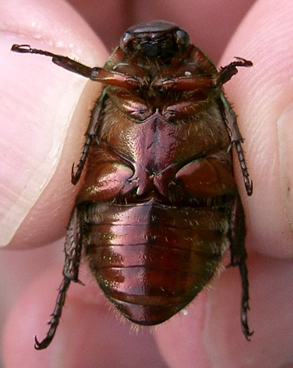 Scientific name Anomala albopilosa